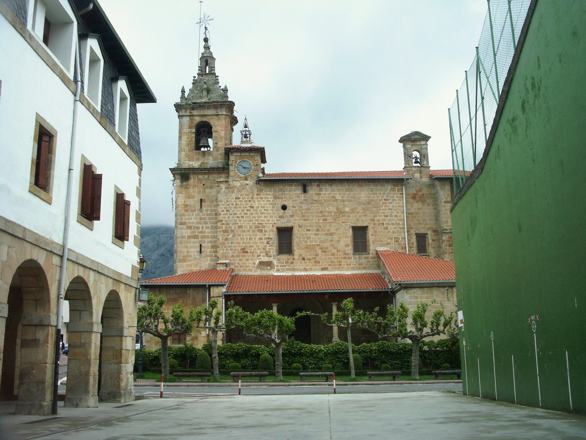 Araiako eliza.